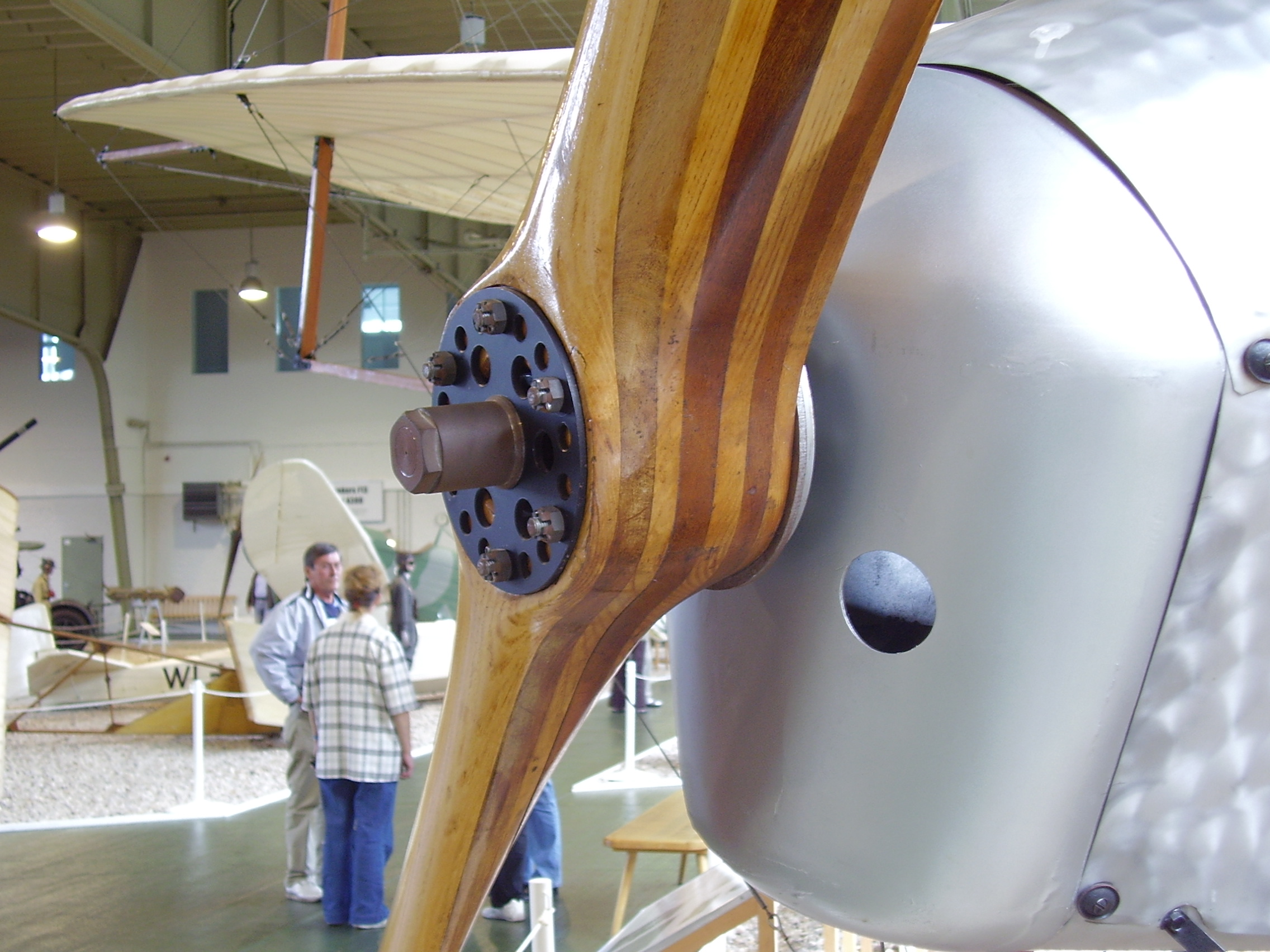 Luftwaffenmuseum der Bundeswehr; Airforce Museum of the Bundeswehr; Berlin-Gatow